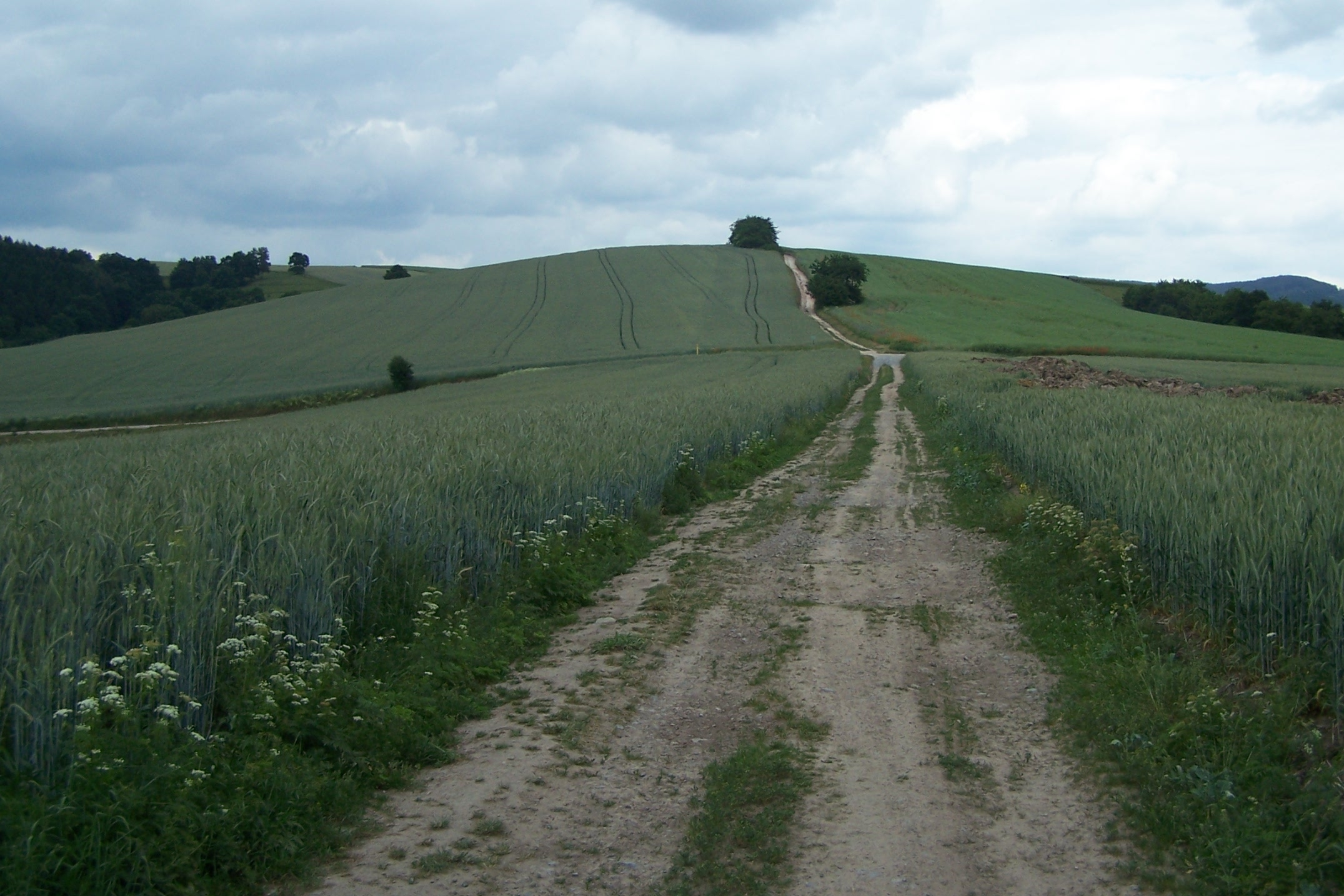 Der Breitunger Rennsteig - Aufstieg von Herrenbreitungen über den Vogelsberg in Richtung Norden.